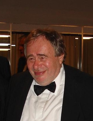 Lopukhin Vladimir